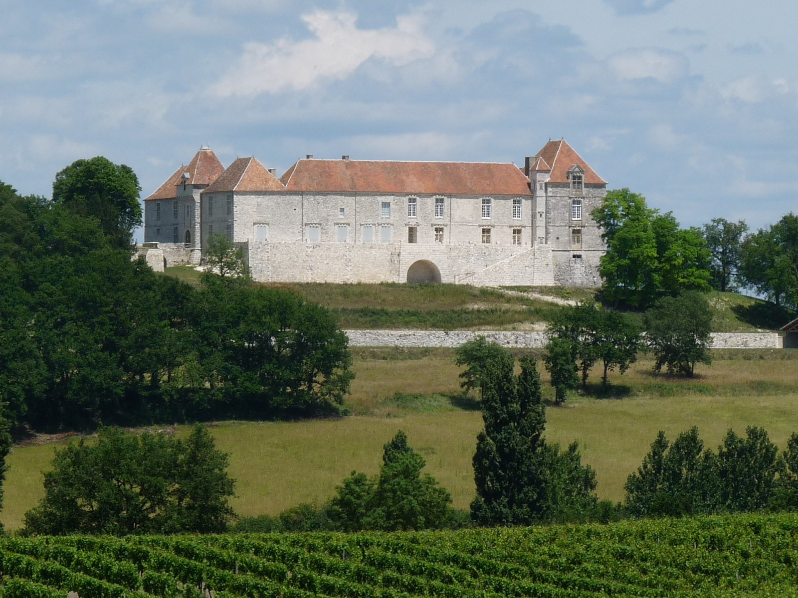 Château Théobon, Loubès-Bernac, Lot-et-Garonne, France